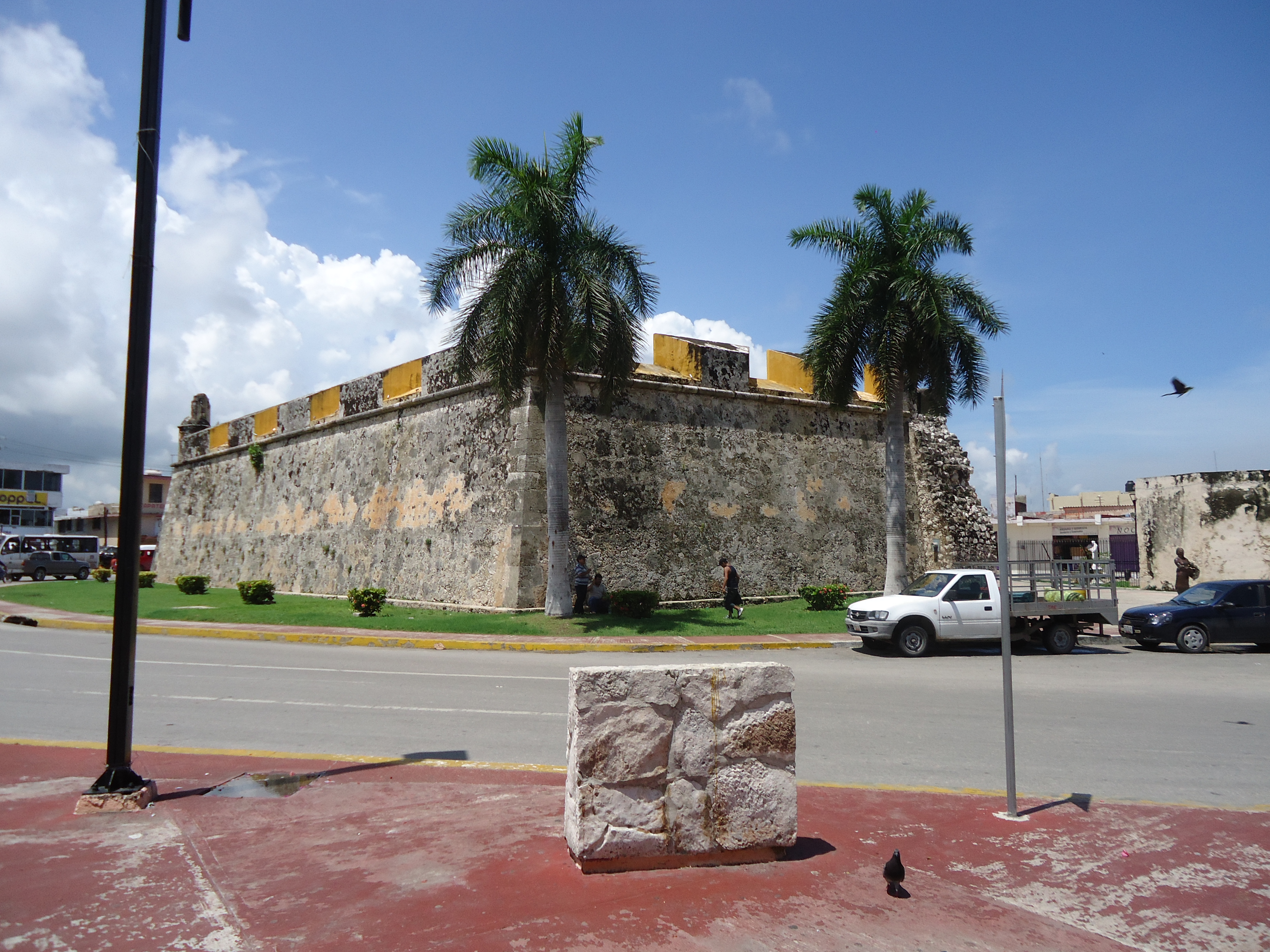 Imagen del baluarte de San Pedro